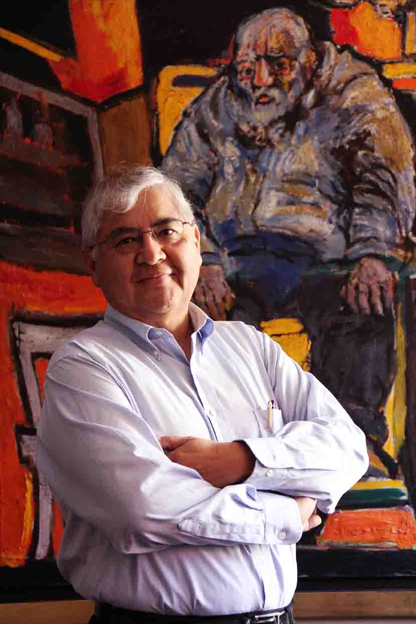 Economista peruano, socio director y fundador de Macroconsult.